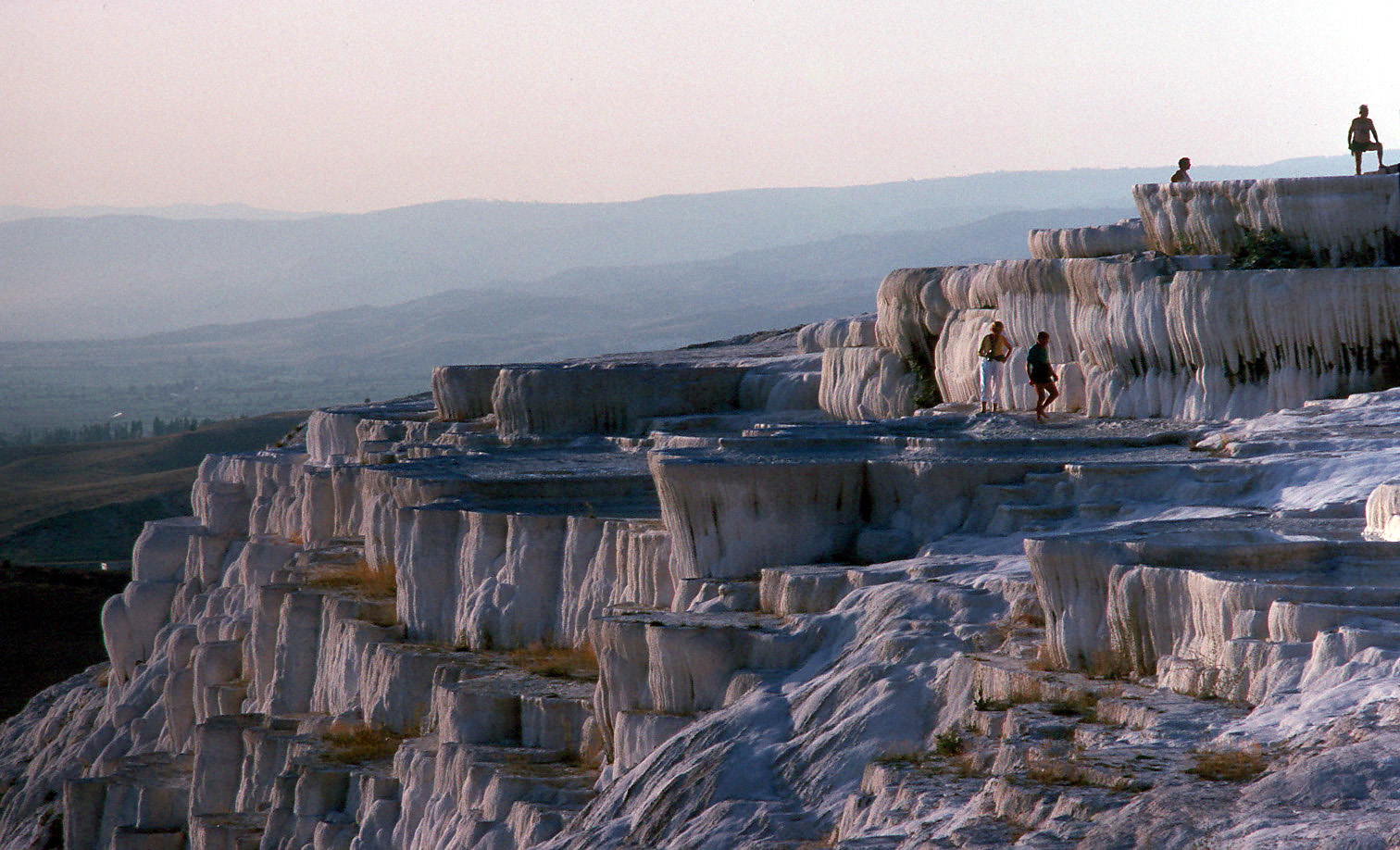 Sinterterrassen bei Pamukkale (Türkei) im Abendlicht.